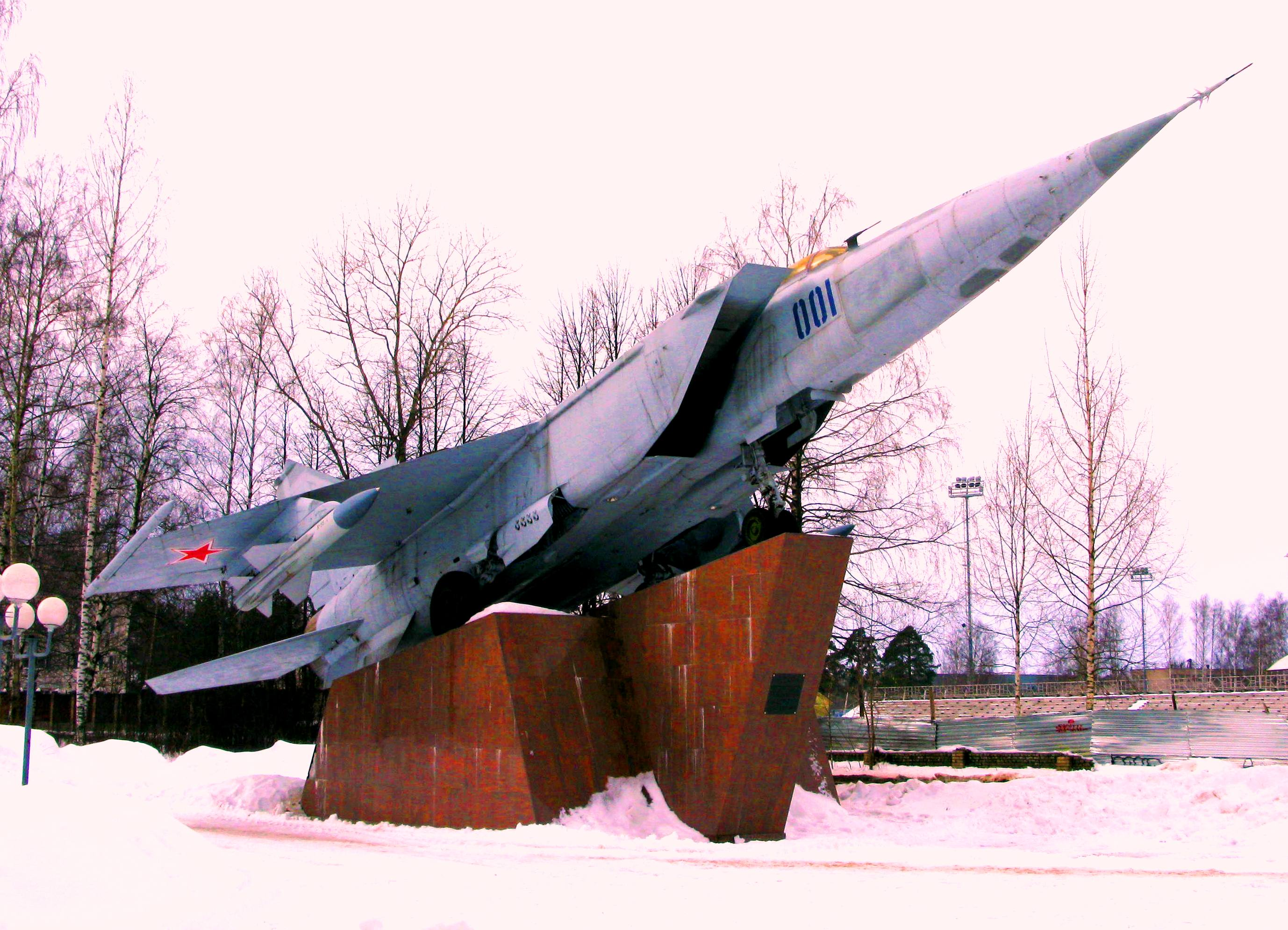 г.Дубна, Московская обл., Россия.